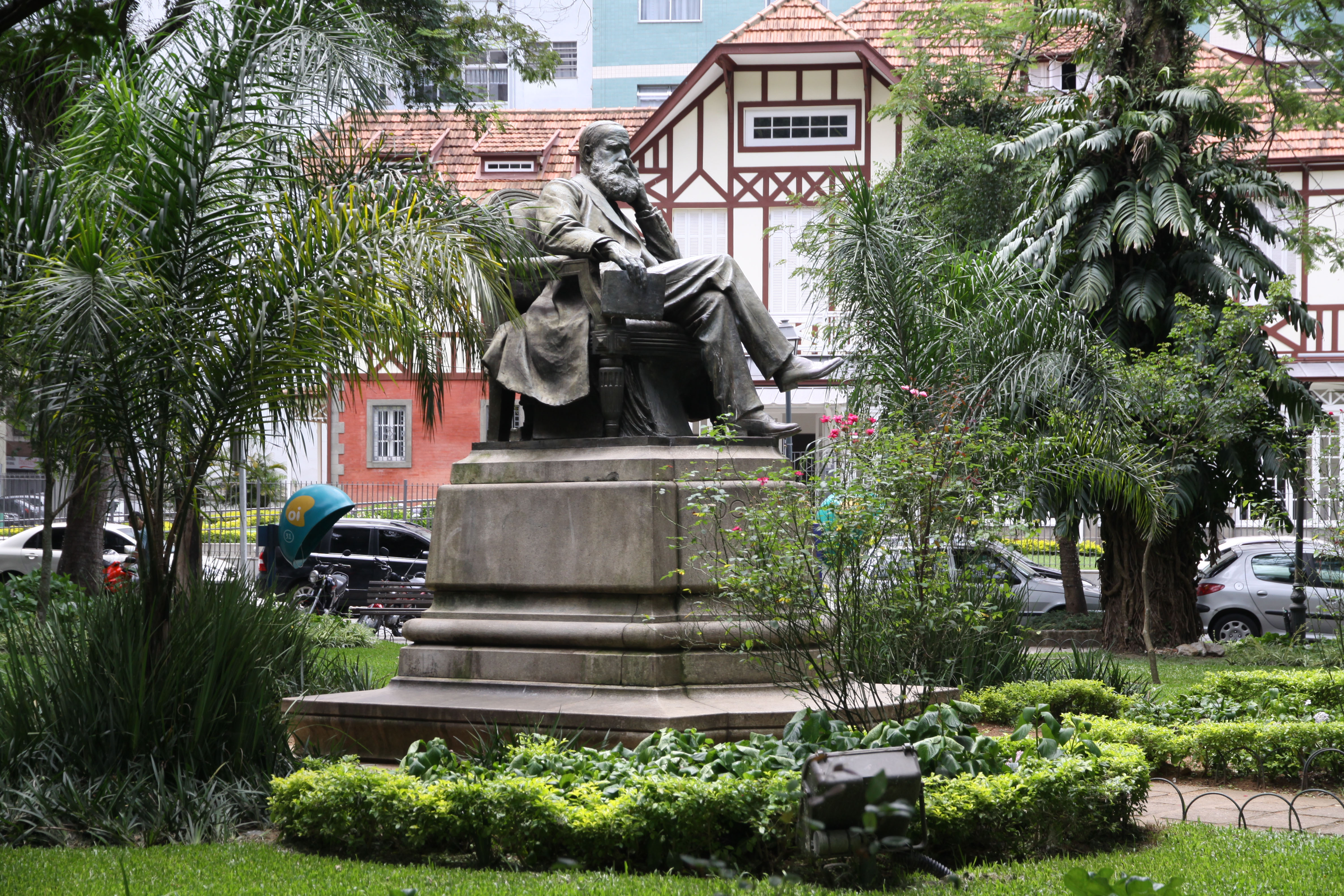 Monumento a Dom Pedro II no jardim da Praça Dom Pedro II em Petrópolis.